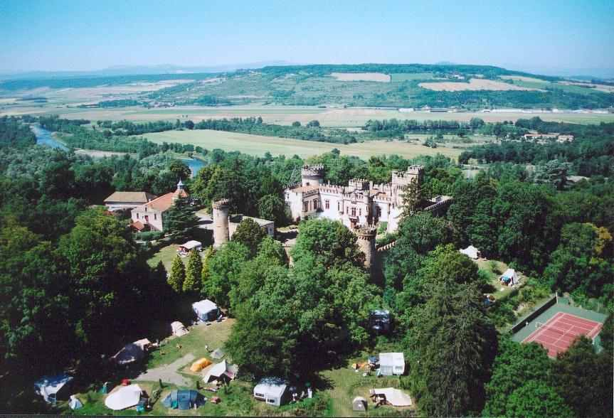 vue aérienne du château de la Grange Fort. (commune Les Pradeaux, département du Puy-de-Dôme, région Auvergne).